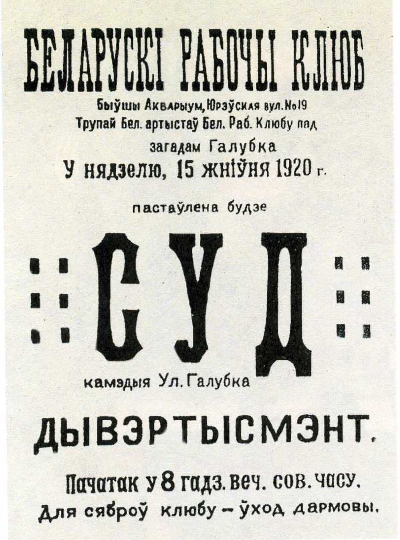 Беларуская (тарашкевіца): Афіша спэктаклю Трупы Галубка ў Беларускім рабочым клюбе